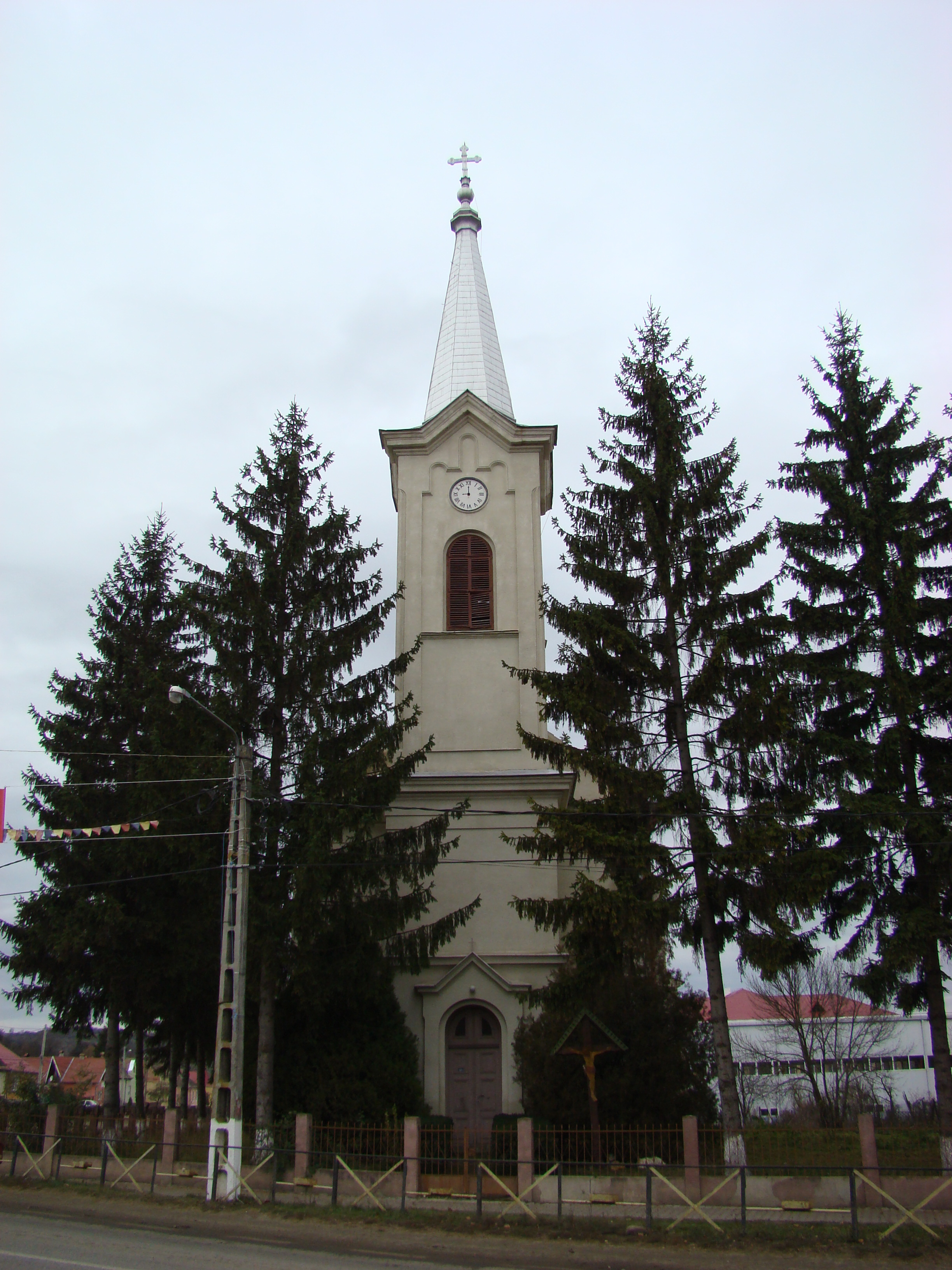 Roman Catholic Church in Teaca (Teke), Bistrița-Năsăud County, Romania